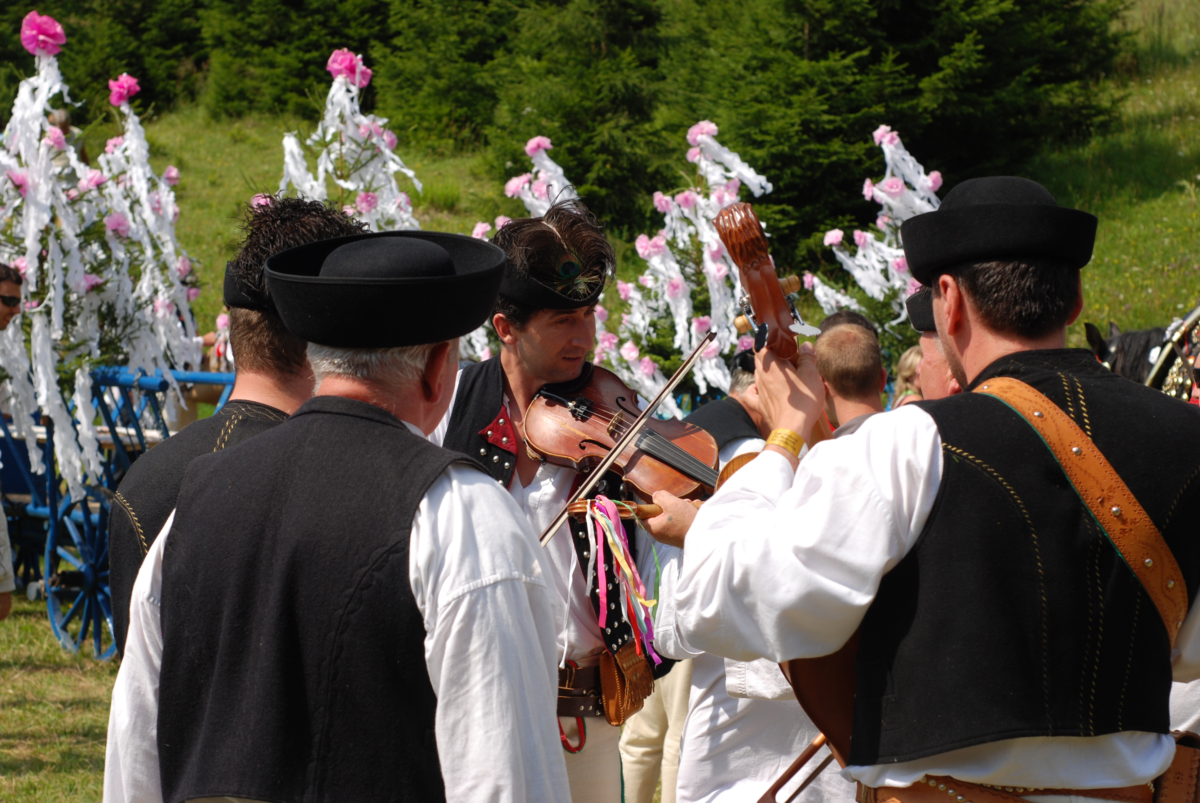 Jánošíkove dni - Terchová - August 2009